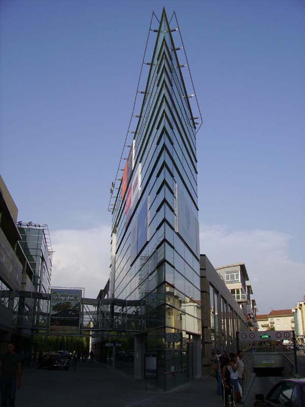 Forum Viseu